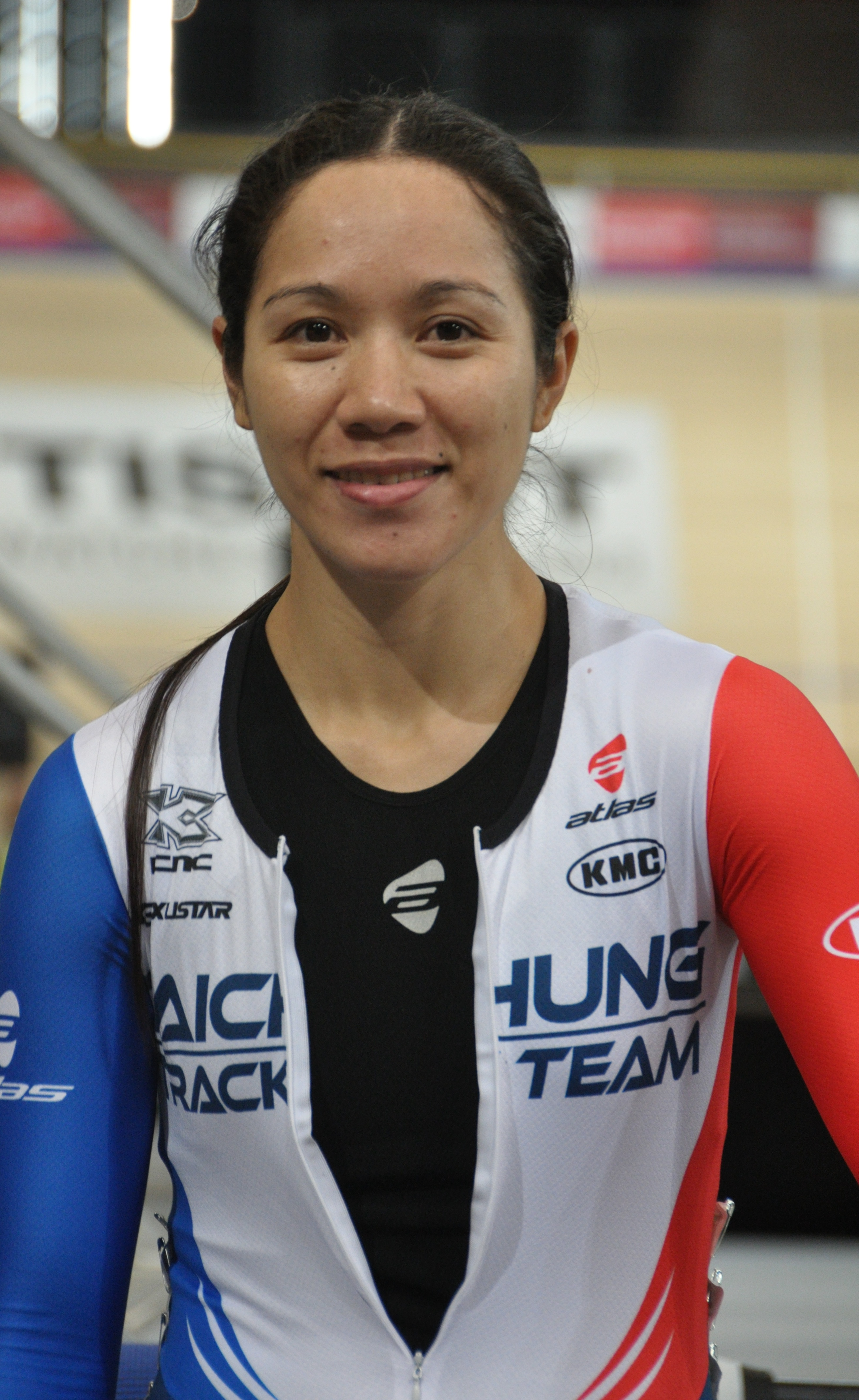 HSIAO Mei Yu, Radsportlerin aus Taiwan